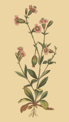 Silene pendula